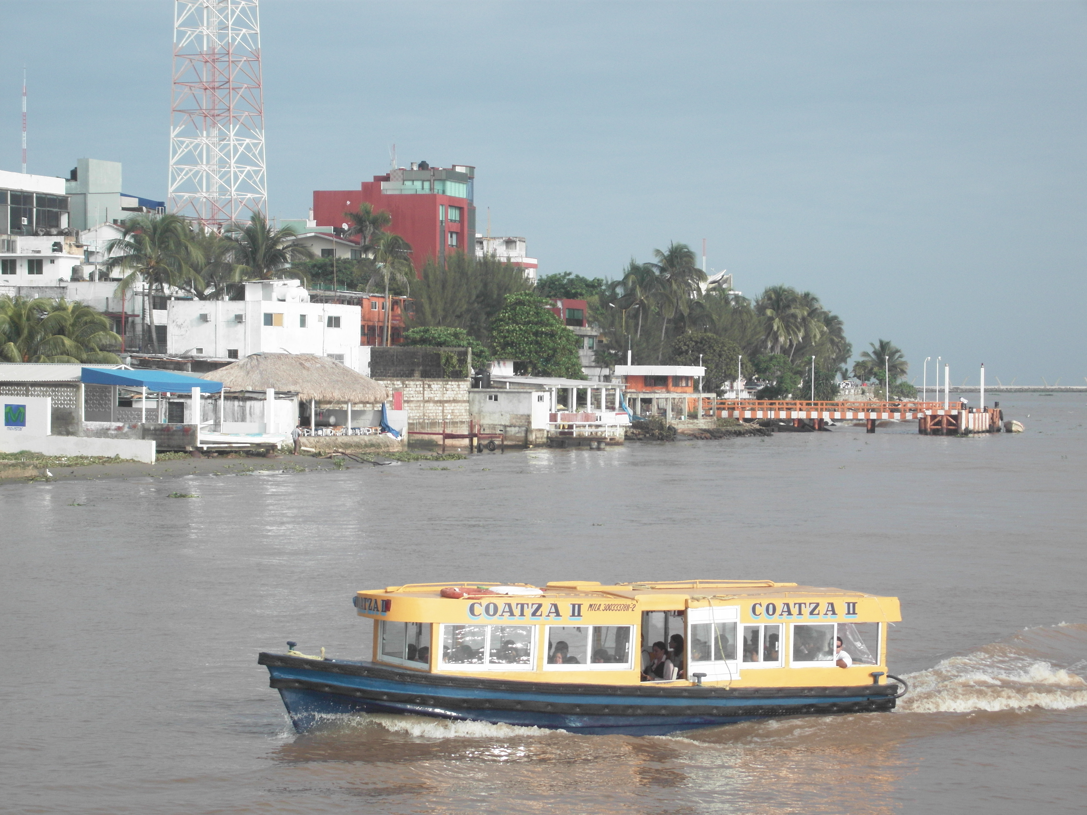 Vista de la parte vieja de Coatza